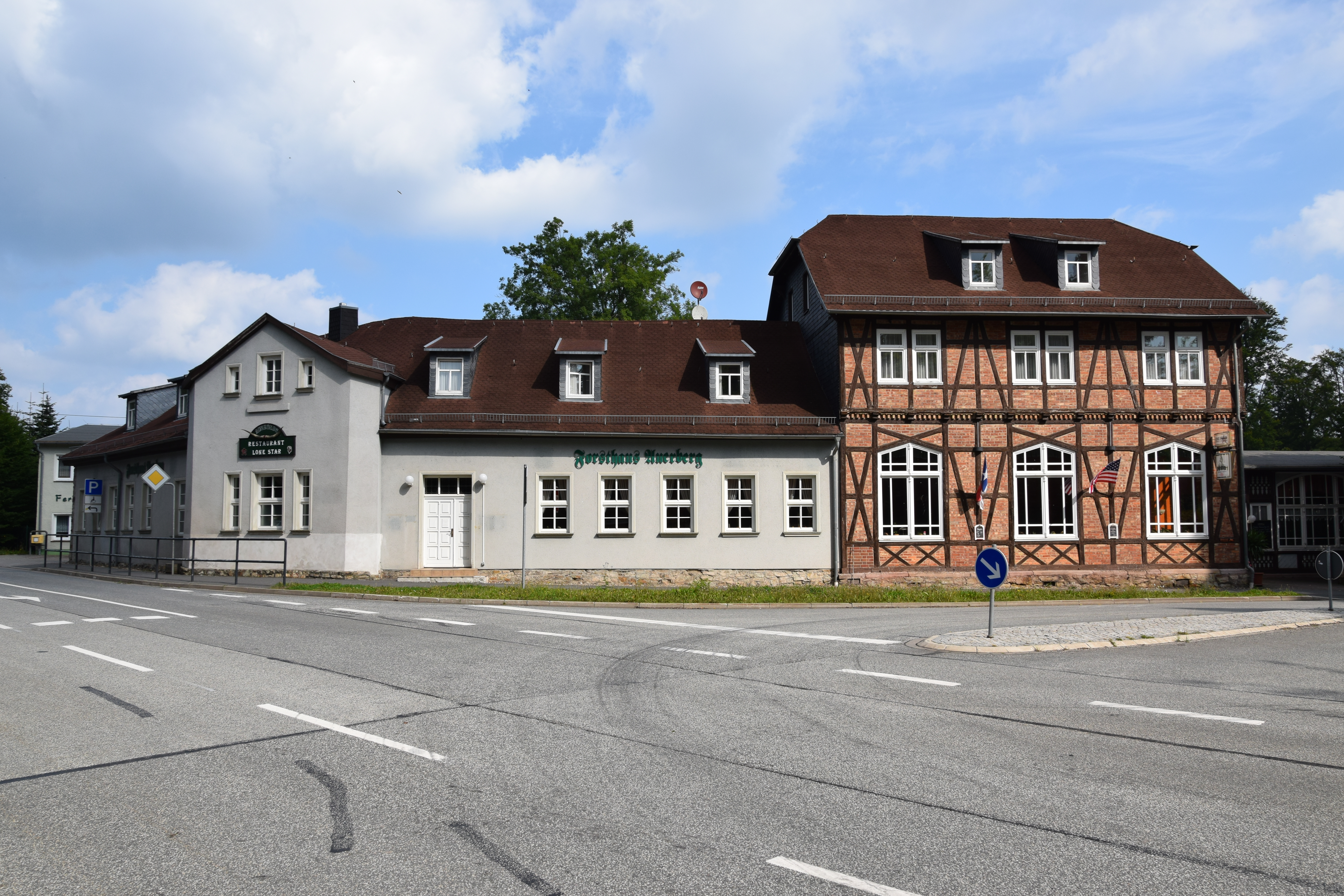 Forsthaus Auerberg mit der Gaststätte „Lone Star“This is a photograph of an architectural monument. 83936